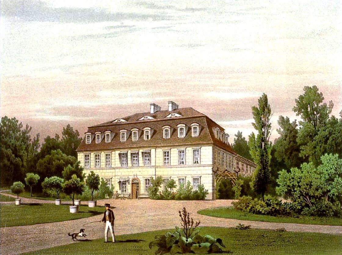 Gut Mallenchen, Lithografie aus dem 19. Jahrhundert